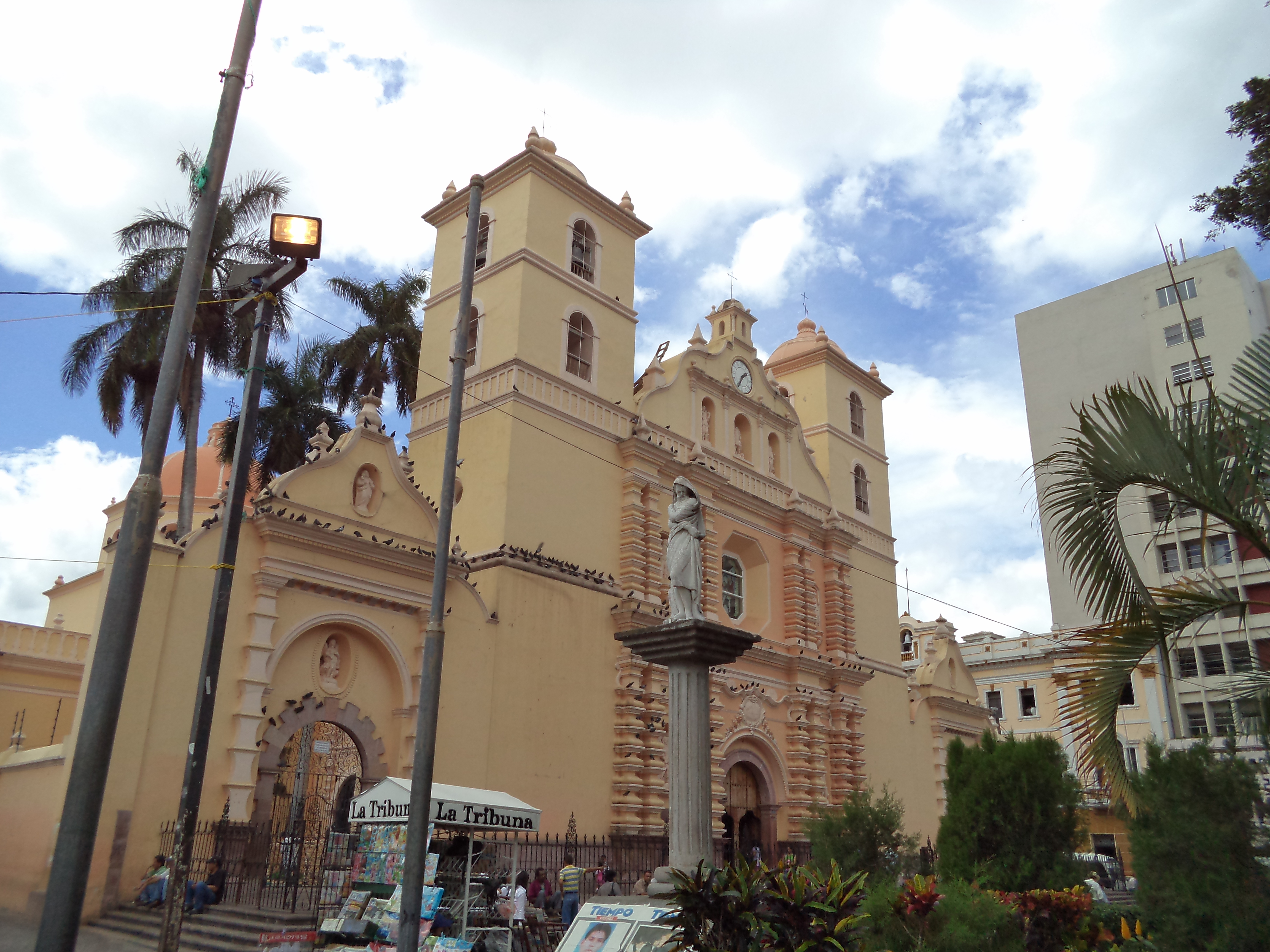 Barrio La Hoya, Tegucigalpa, Honduras